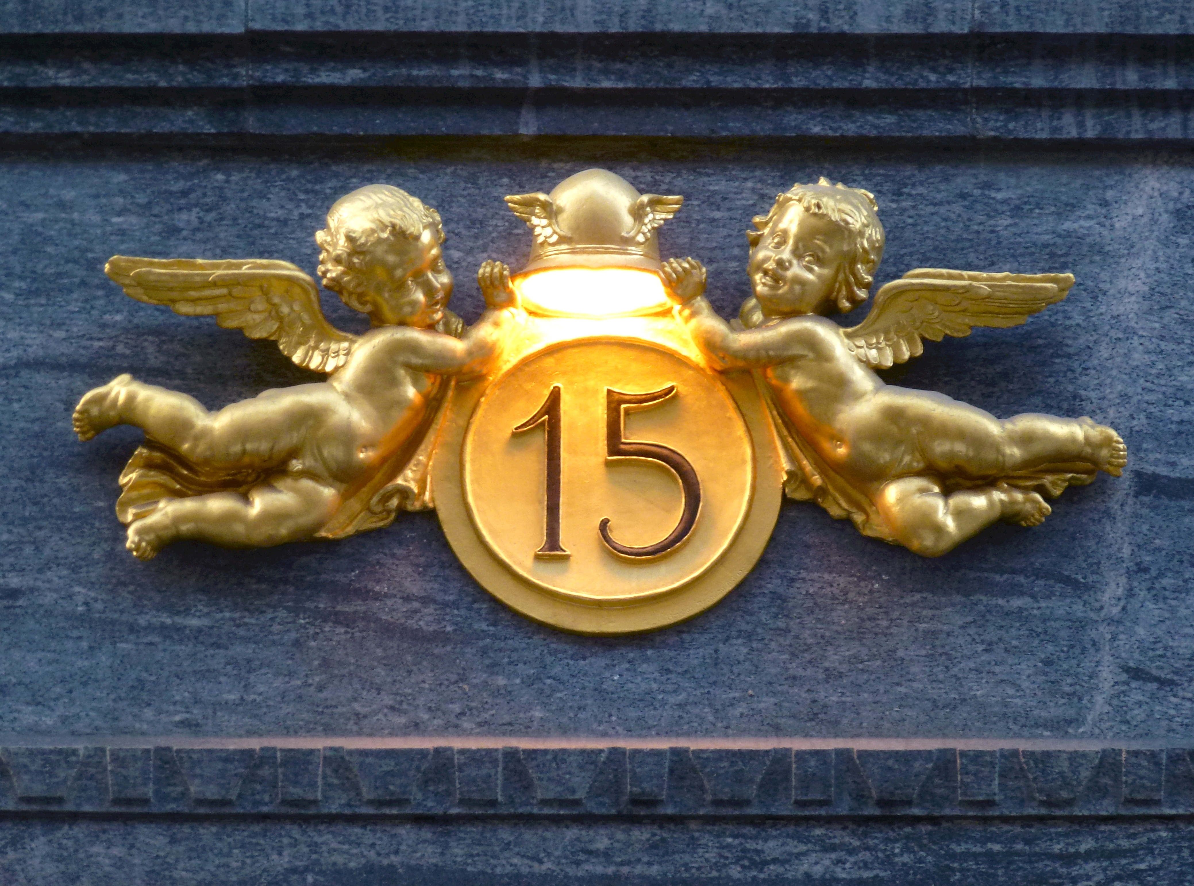 Husnummer Tändstickspalatset nr 15